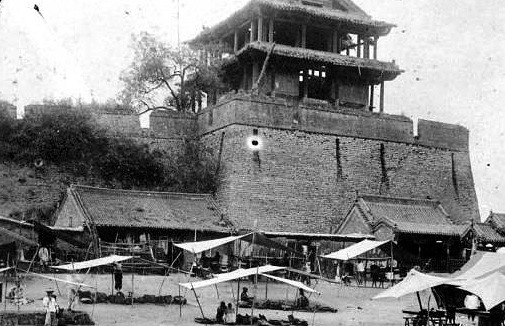 中文（中国大陆）: 沈阳小东门外菜行